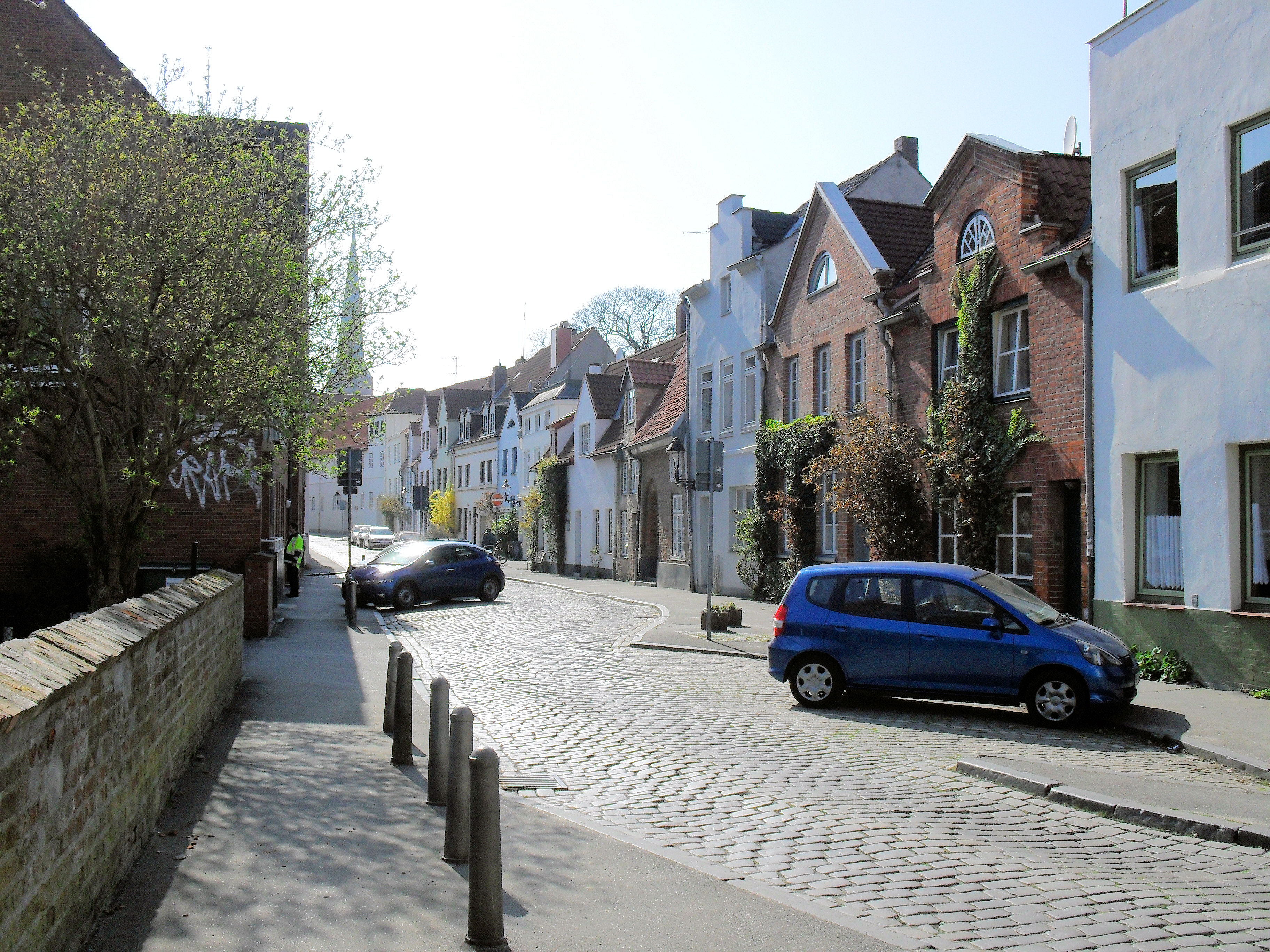 An der Mauer in Lübeck